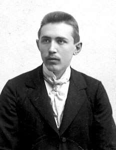 Gillemot Ferenc magyar labdarúgó, edző, játékvezető, sportújságíró, a magyar labdarúgó-válogatott első szövetségi kapitánya.